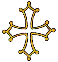 Lo stemma dei Bosonidi, che governarono la Provenza come duchi, re e marchesi dall'877: verrà poi conosciuto come croce di Tolosa o Occitana.